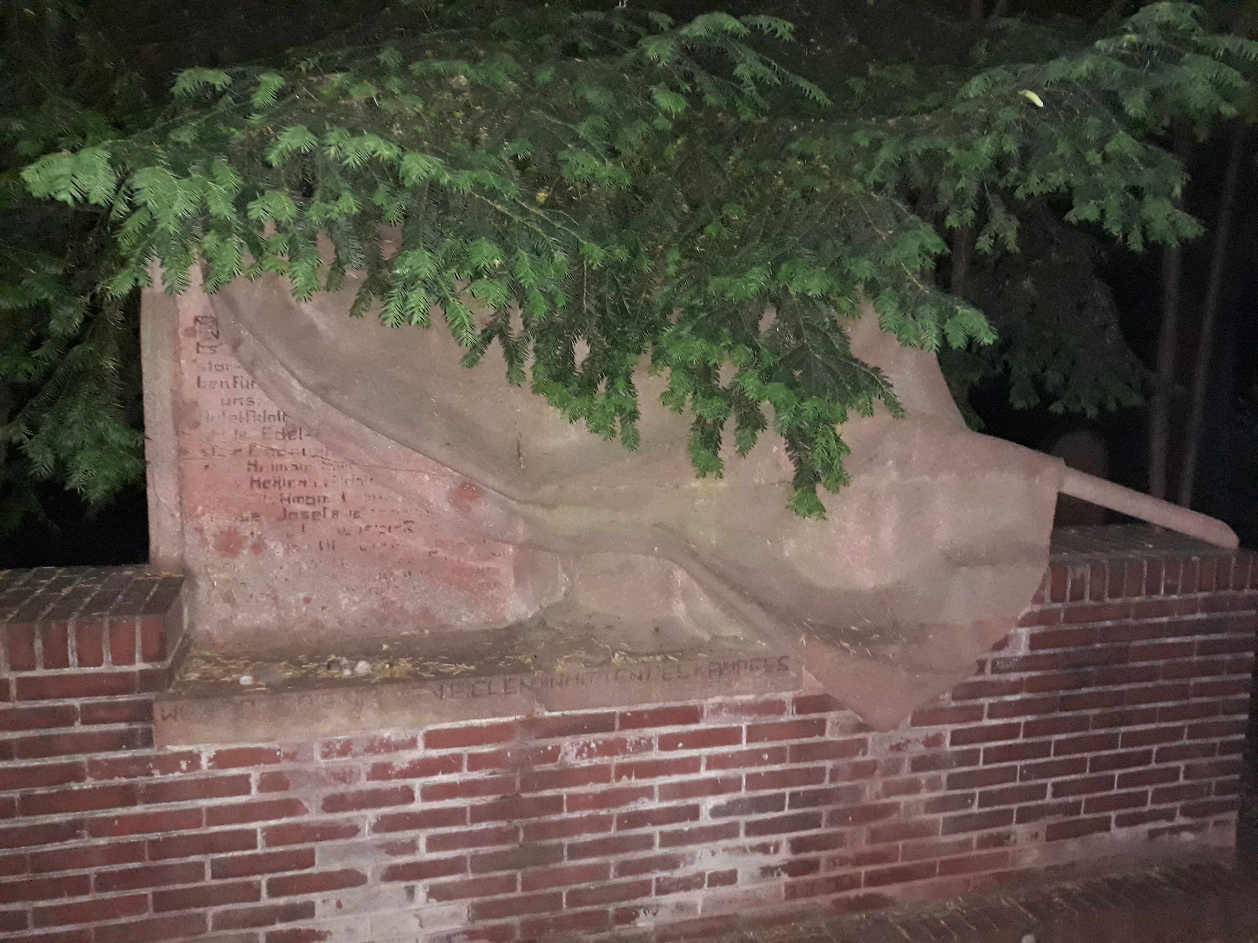 Das Ehrenmal für die Ersten Weltkrieg gefallenen Mitglieder der Jüdischen Gemeinde Bonn auf dem Jüdischen Friedhof Bonn-Castell.